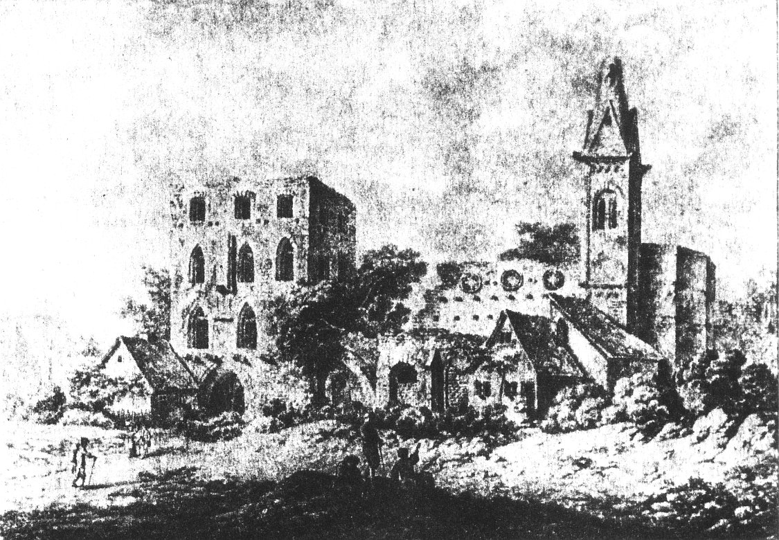 Speyer, Ruine der Nikolauskapelle und Domstaffelturm